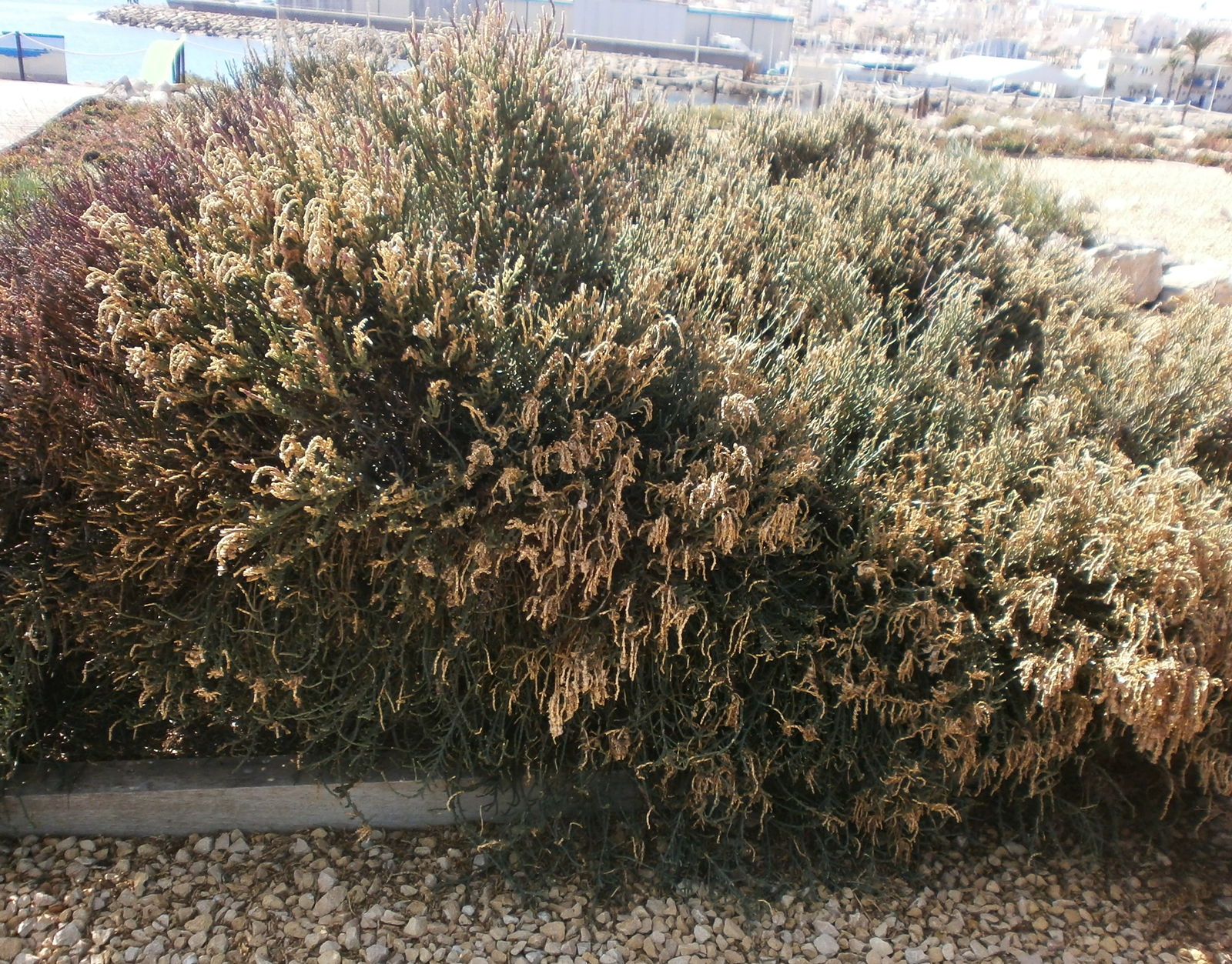 Salicornia articulada (Anabasis articulata) en Alicante, España.